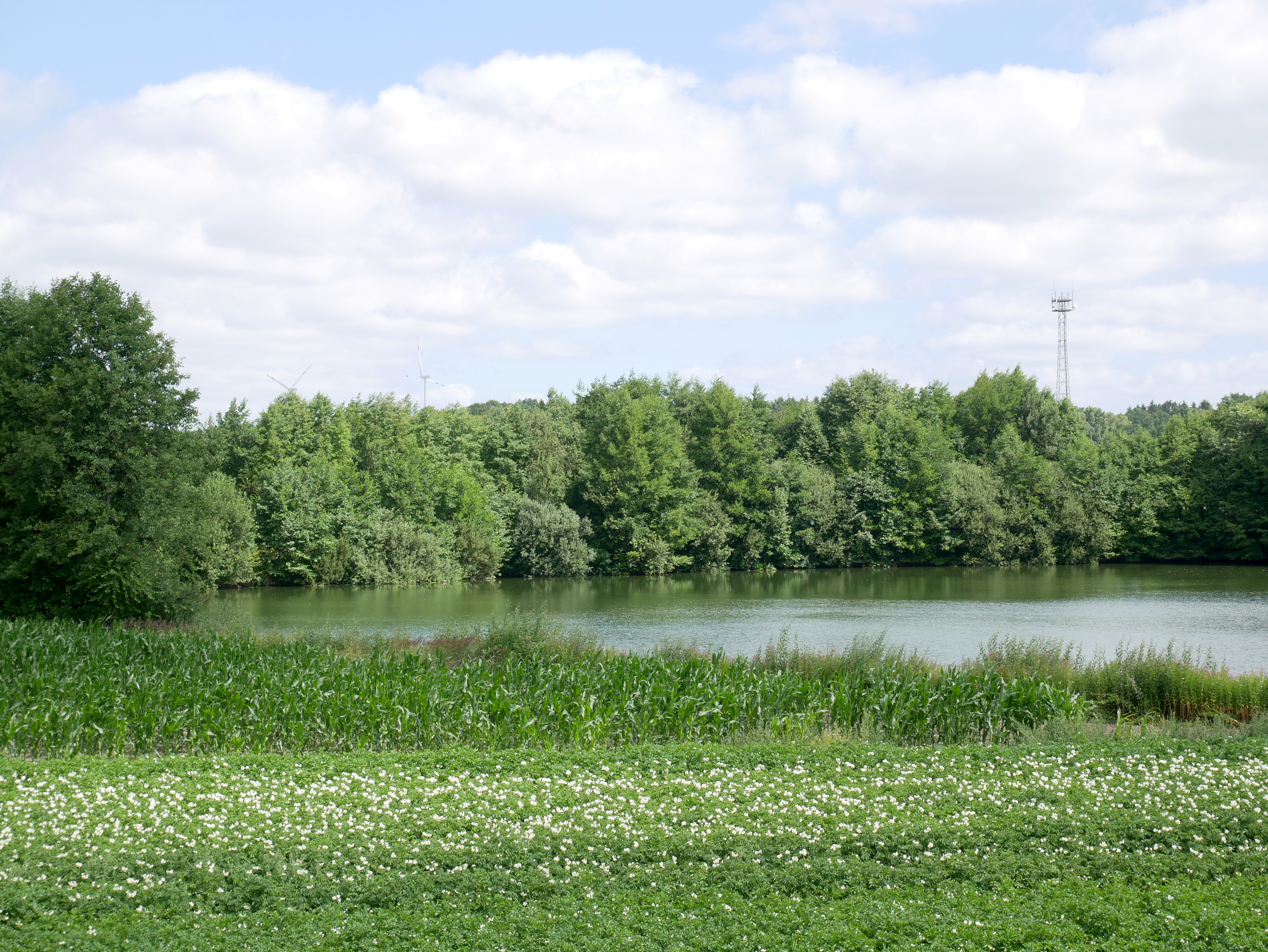 Einer der Leverdinger Teiche, gesehen vom Vogelbeobachtungsturm aus.